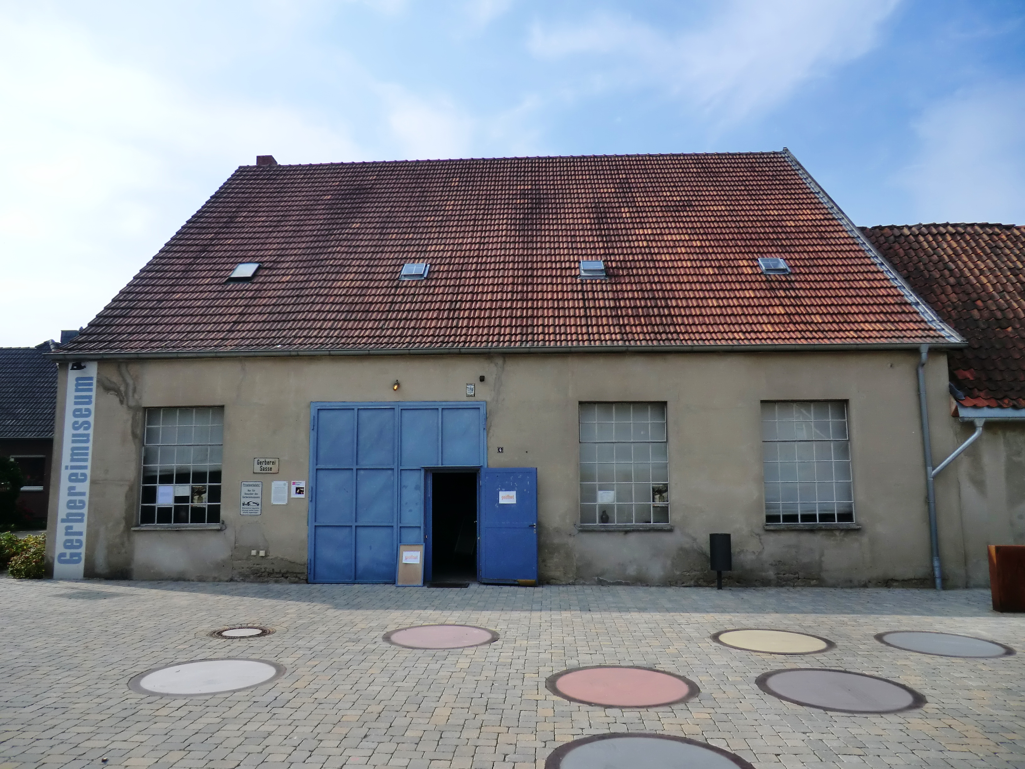 Ehemaliger Gerbereibetrieb, Gerbereimuseum EngerThis is a photograph of an architectural monument.